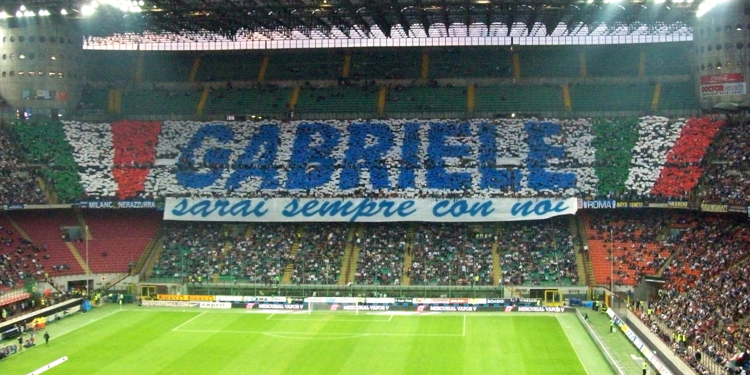 Tribute to Gabriele Sandri, a deceased supporter of S.S. Lazio, from FC Internazionale Milano supporters before the 2008-09 Serie A match between FC Internazionale Milano - S.S. Lazio (2 may 2009 at Giuseppe Meazza Stadium in Milan).